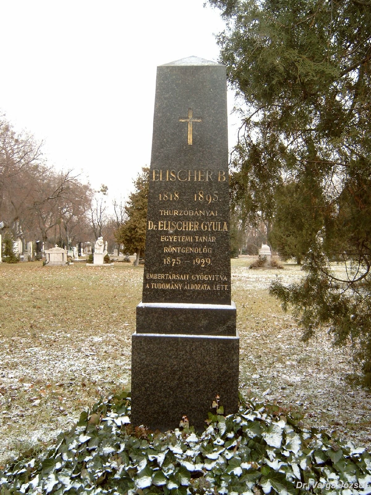 Elischer Gyula (Budapest, 1875. február 28. – Budapest, 1929. december 16.) röntgenológus, egyetemi tanár sírja Budapesten. Kerepesi temető: 35-1-97